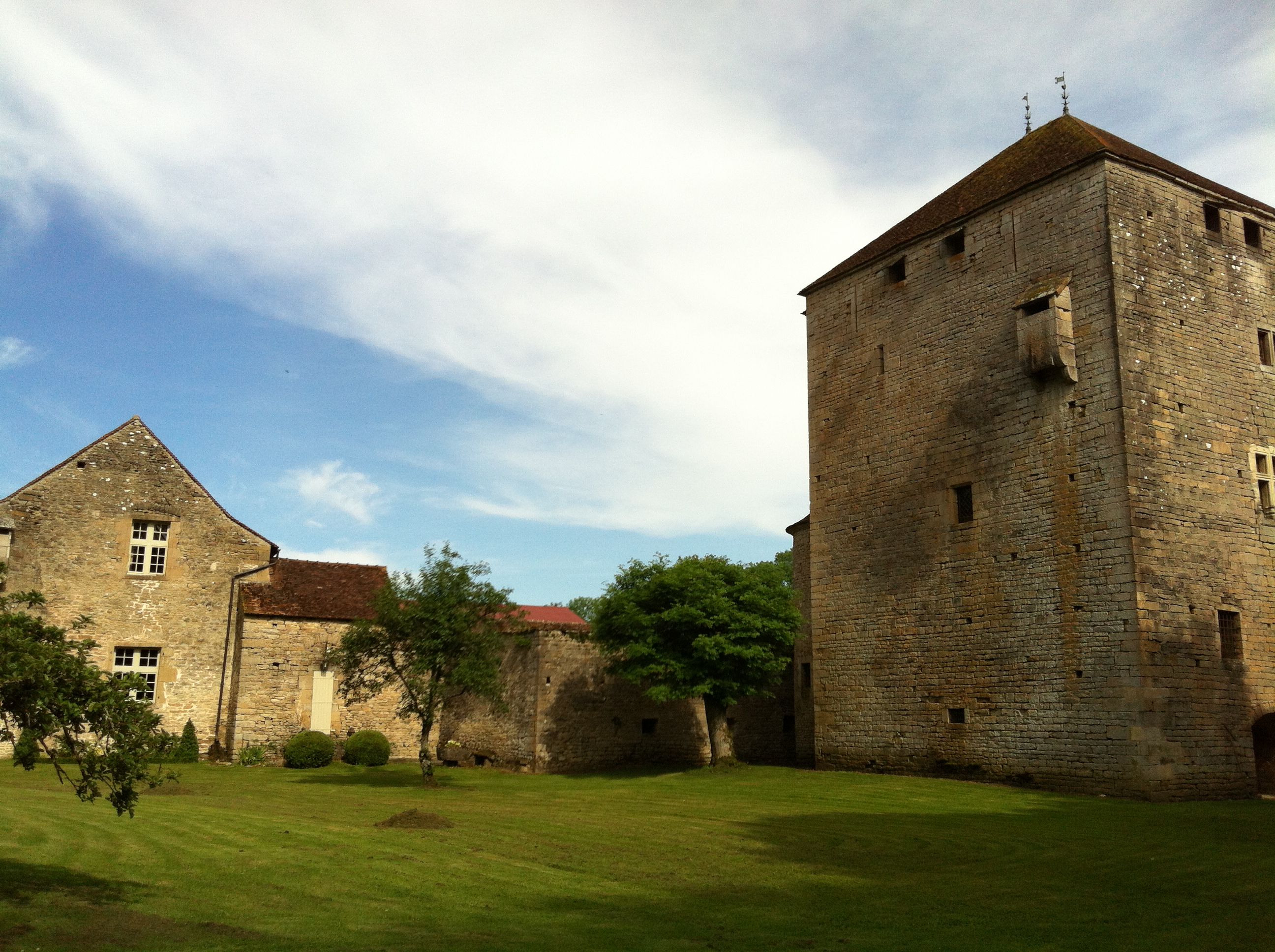 Château de Soussey-sur-Brionne (21) .